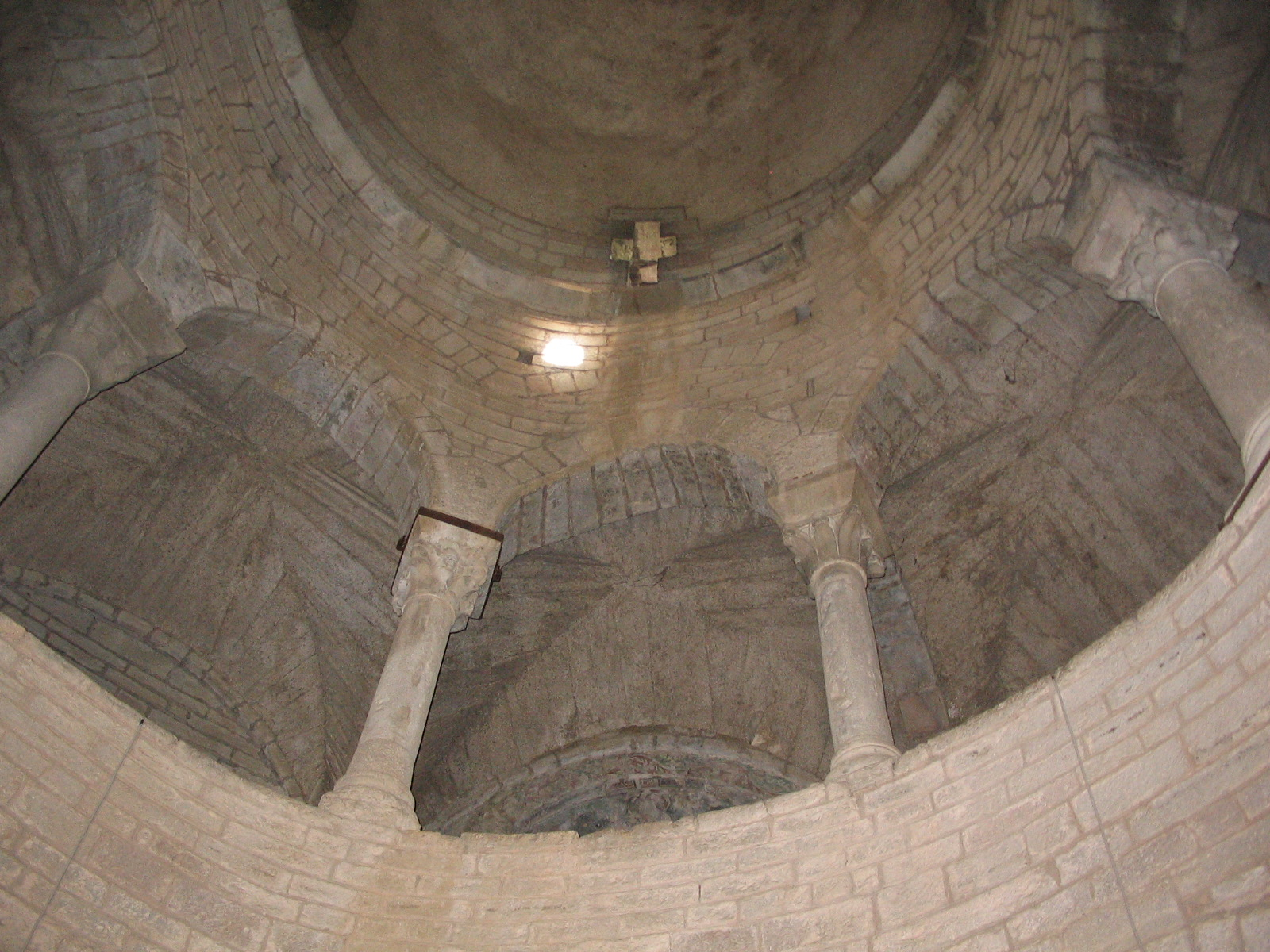 Autore Giorces. San Tomè, matroneo dal basso.